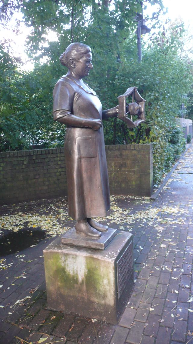 Hilden, Plastik, Berta Bruchhausen, Am Rathaus. Dieses Denkmal von 1939 aus Bronze erinnert an die Die Zwirnmeisterin Berta Bruchhausen, eine treue Arbeiterin der ehemaligen Hildener Textilfirma Spindler. In ihrer linken Hand hält sie eine Haspel, auf die ihr ernster Blick gerichtet ist. Von den Schuhbändern über die Gesichtszüge bis hin zur Schleife des Arbeitskittels hat Emil Jungblut die Details naturgetreu dargestellt. Auftraggeber der Plastik war Textilfabrikant Paul Spindler. Berta Bruchhausen, die schon mehr als 40 Jahre im Unternehmen arbeitete, sollte „Gefolgschaftstreue“ symbolisieren. Ursprünglich stand die Plastik am Firmengebäude in der Klotzstraße.